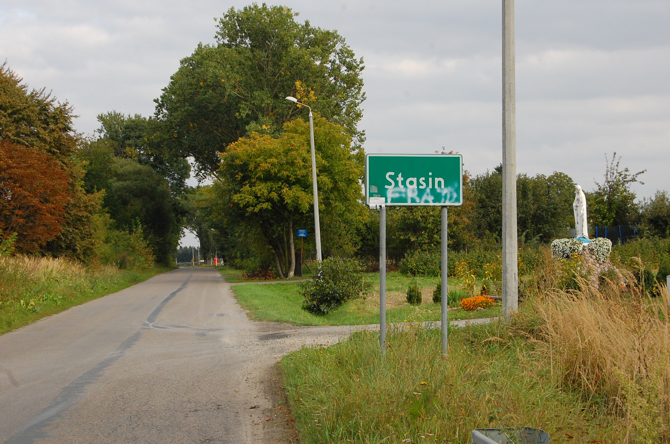 Wjazd do Stasina